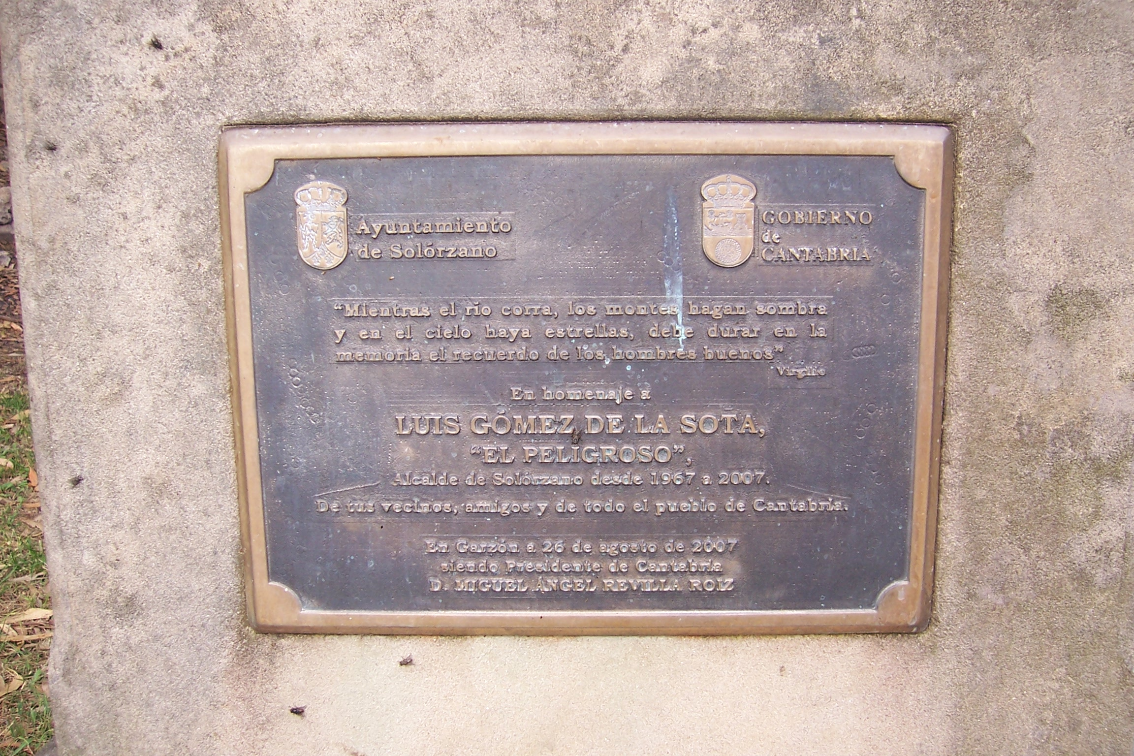 Localidad de Garzón en Solórzano (Cantabria, España). Zona recreativa. Placa en homenaje al alcalde Luis Gómez de la Sota.